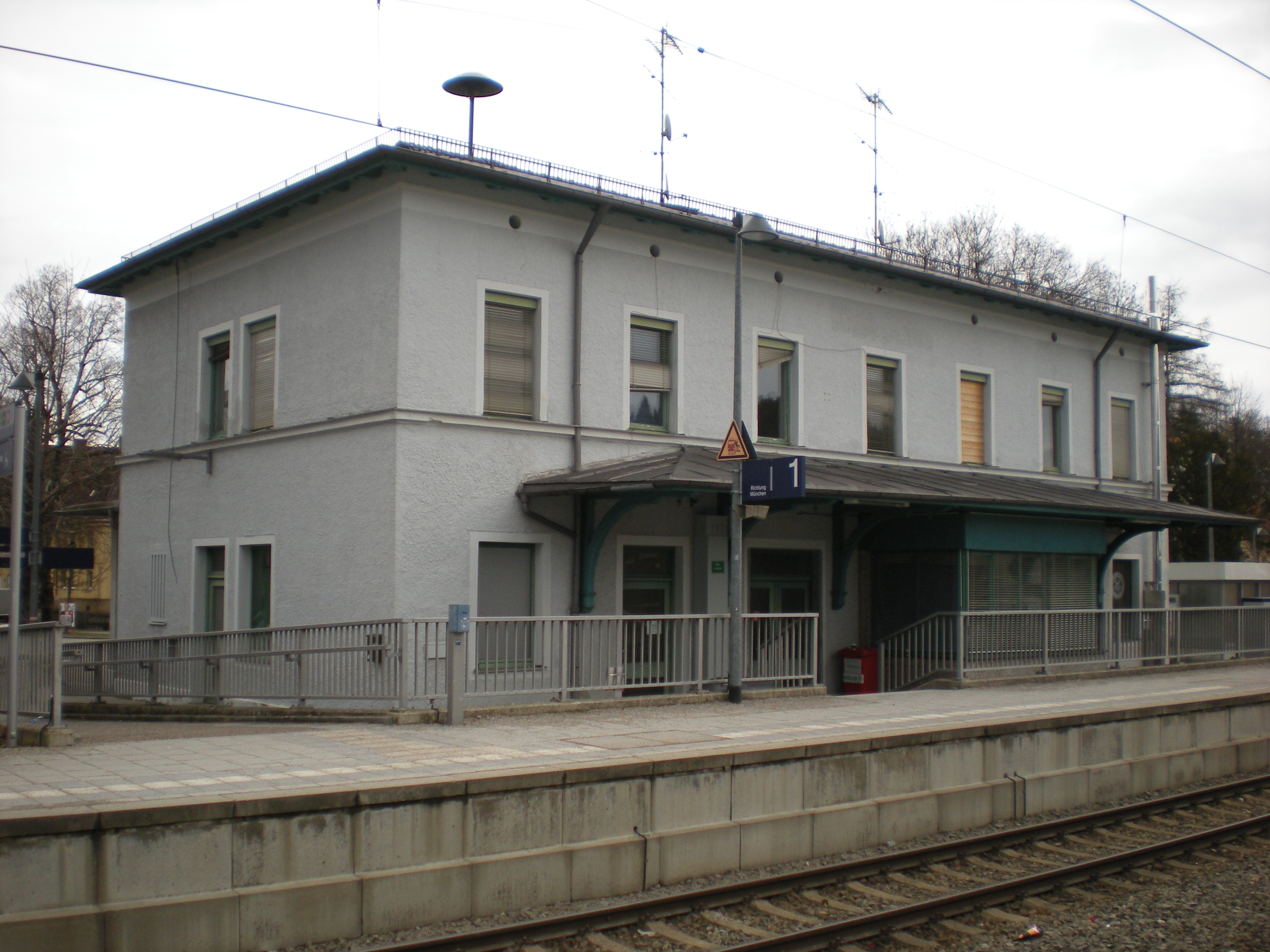 Empfangsgebäudes des Münchner S-Bahnhofs Kirchseeon von der Gleisseite